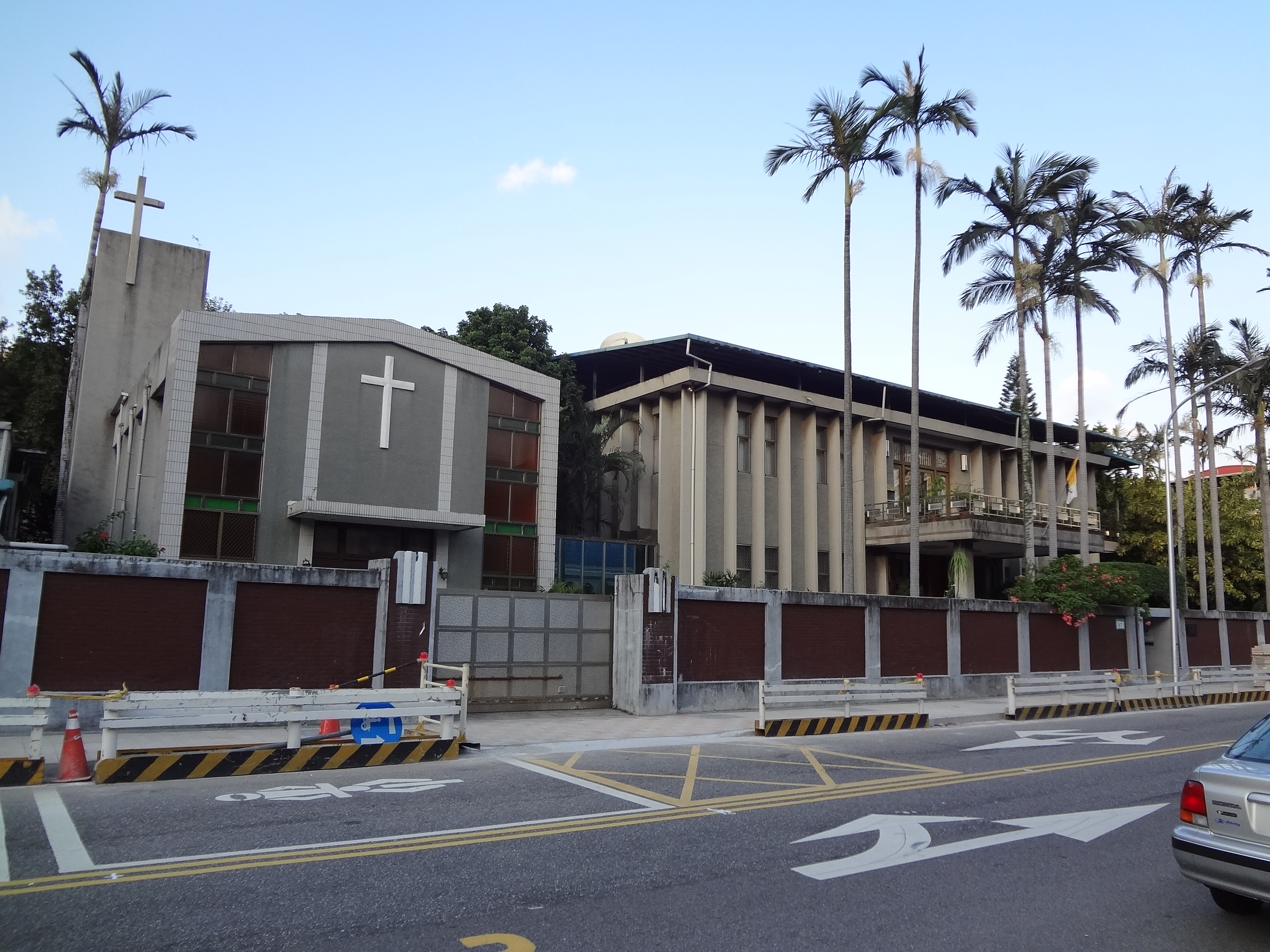 教廷駐華大使館舊址，位於臺灣臺北市中正區愛國東路87號。